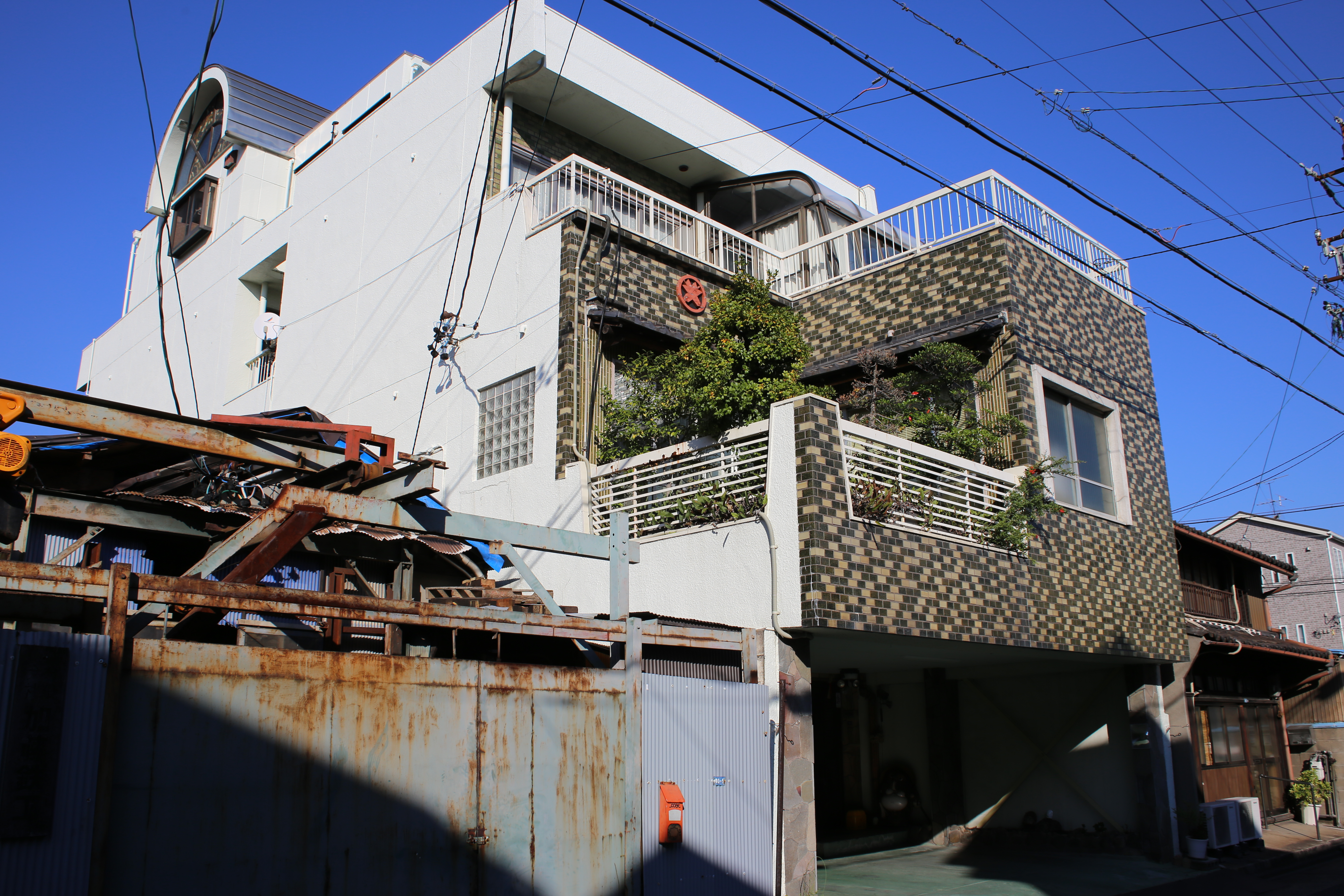 名古屋市熱田区明野町の山下工作所本社を南側公道西側より撮影